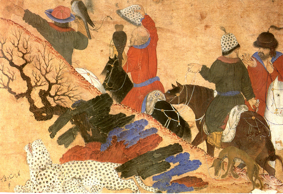 قوش‌بازان سوار بر اسب، نگارگری ایرانی، هرات، مکتب ترکمانان، احتمالاً از درویش محمد یا سیاه قلم، موزهٔ توپقاپی استانبول، خزینهٔ ۲۱۶۰.